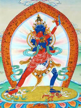 איחוד של היבטי בודהה